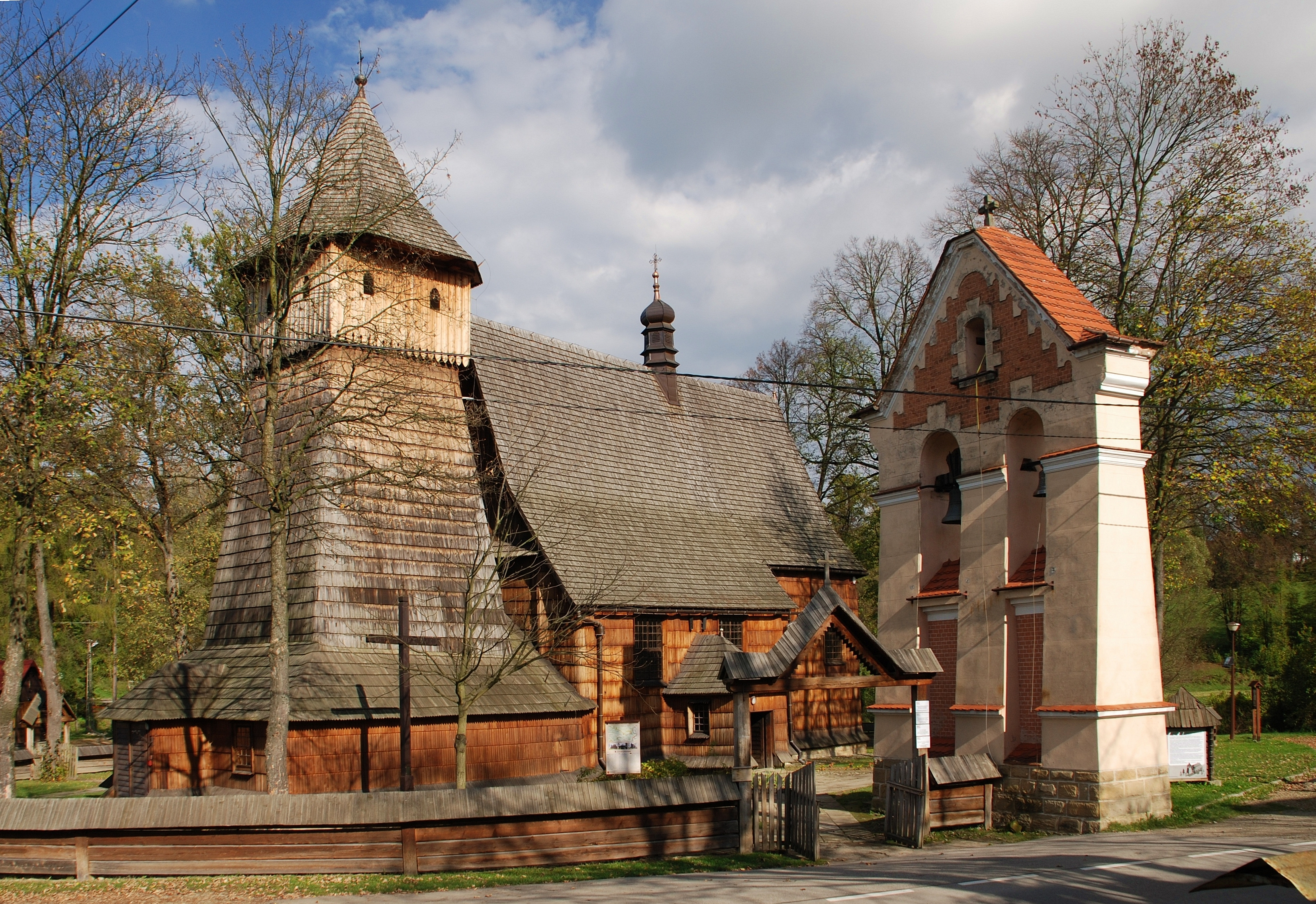 kościół